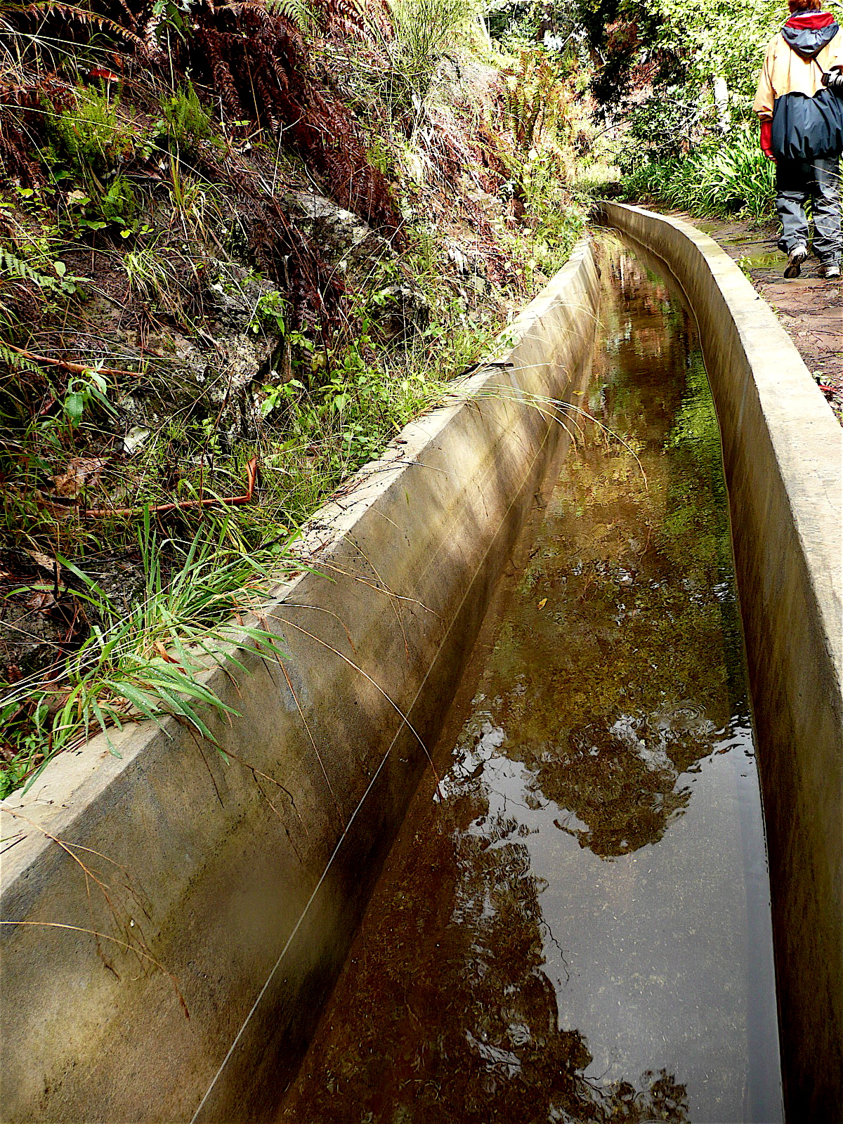 Levada - Prazeres